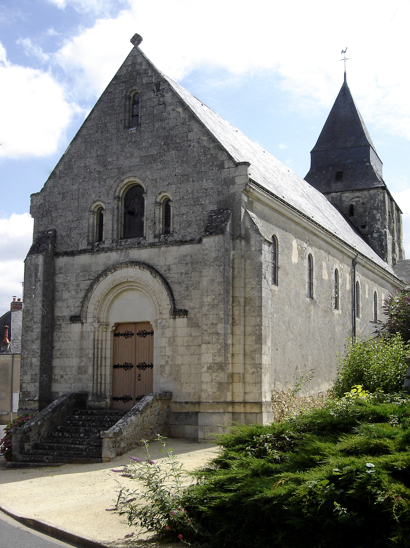 Église Saint-Martin d'Echemiré (Maine-et-Loire)